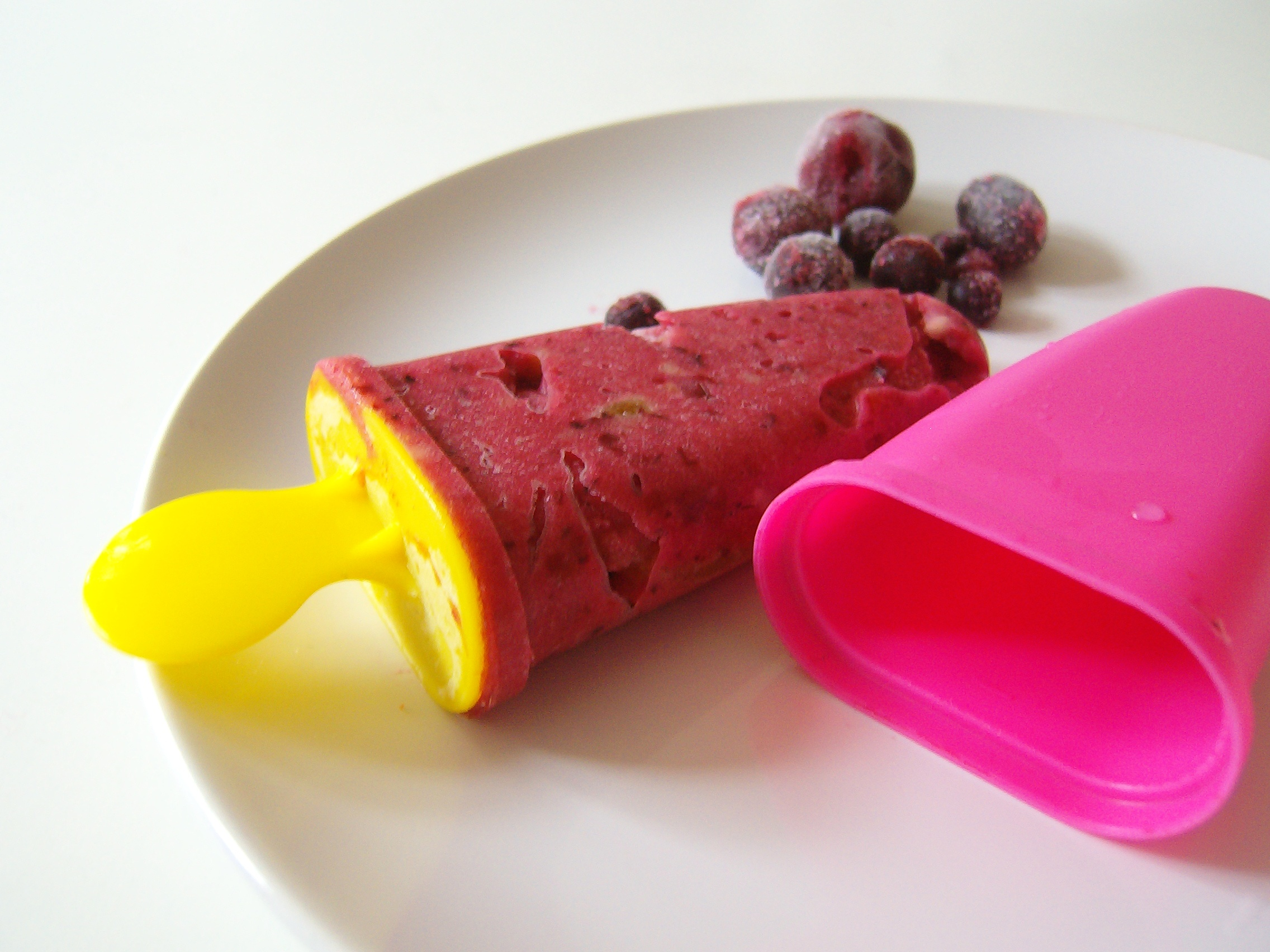 Fruit ice lollies